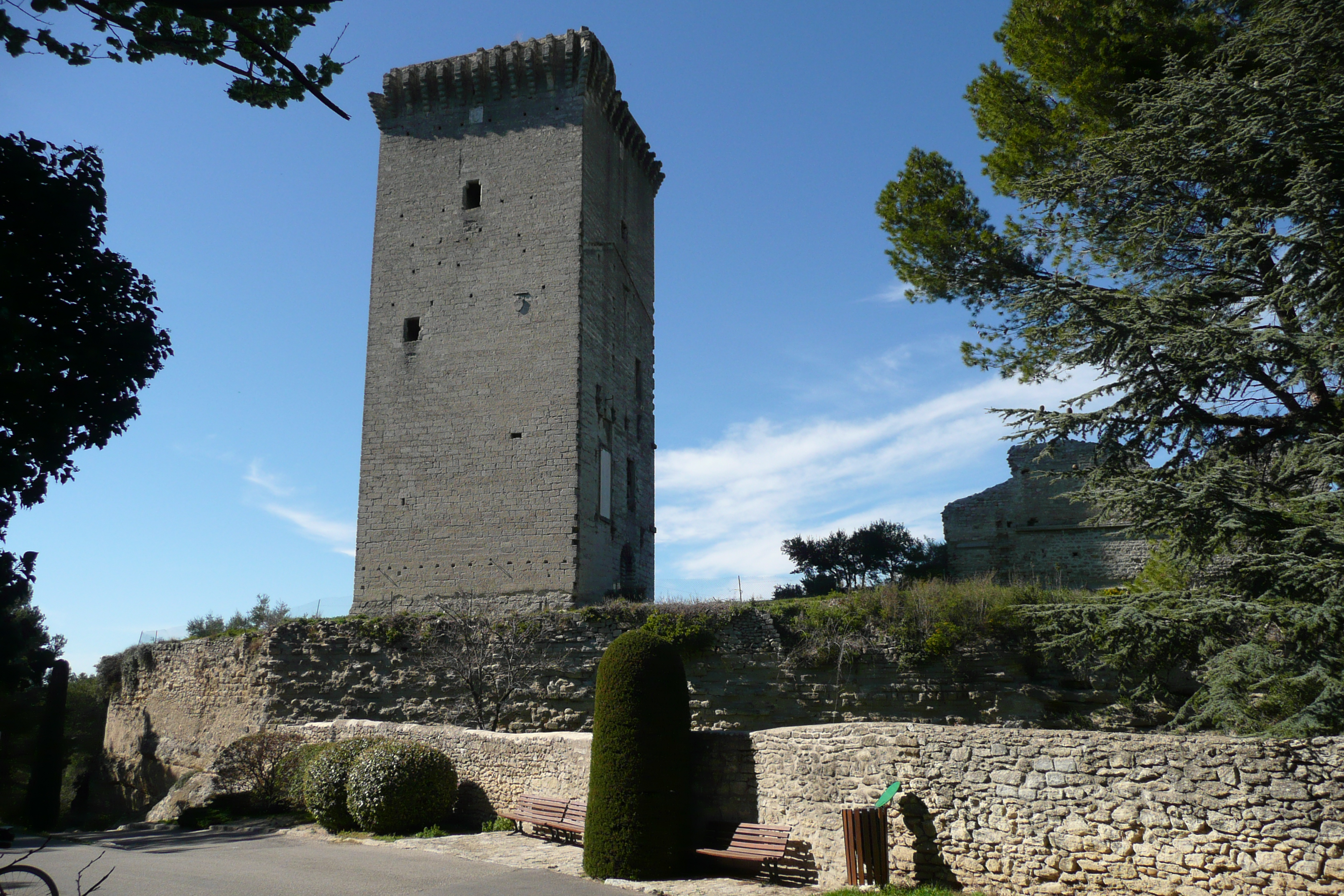 Tour Anglica 14 èmes siècles à Barbentane 2.